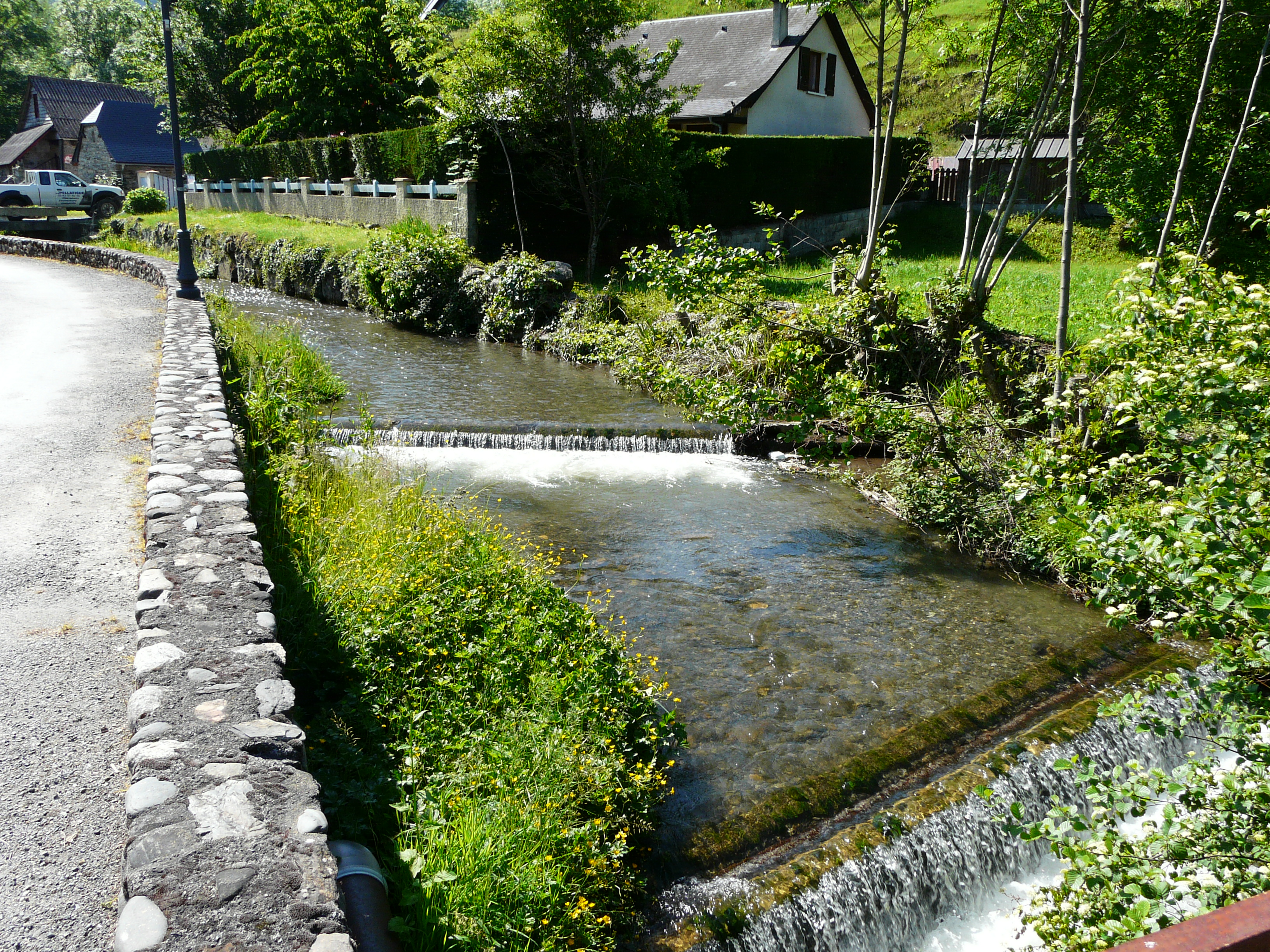 Le ruisseau de Saint-Pastous dans le village de Boô, Boô-Silhen, Hautes-Pyrénées, France. Vue prise en direction de l'amont.